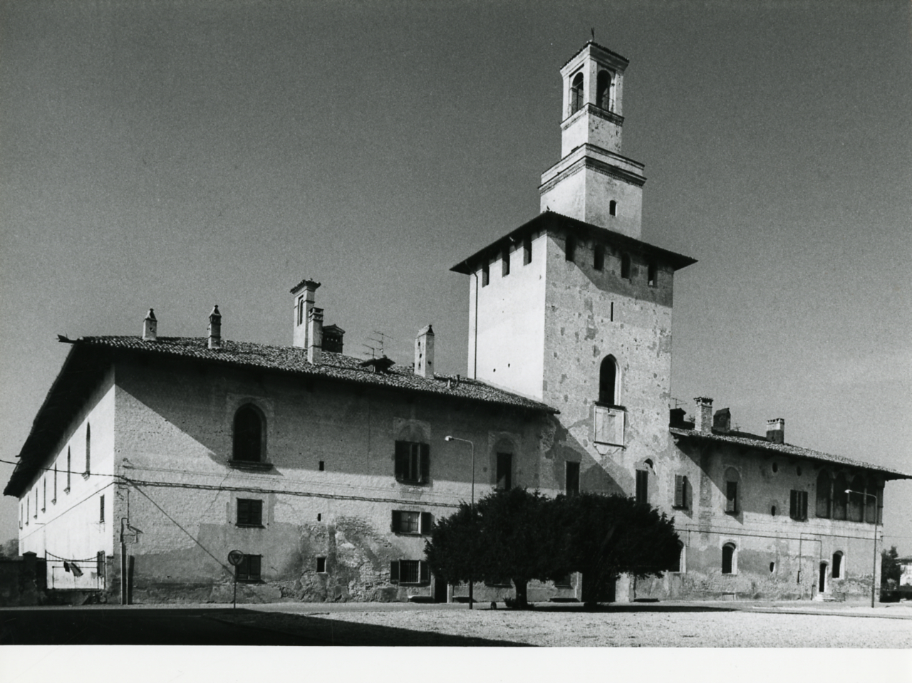 Servizio fotografico : Cusago, 1980 / Paolo Monti. - Stampe: 2 : Positivo b/n, gelatina bromuro d'argento/ carta, 24x30. - ((Al verso delle stampe manoscritti i numeri dei negativi corrispondenti (formato 35 mm) con indicazione del fotogramma: 3561/1, 3561/2. - Timbro a inchiostro con copyright: "© Copyright/ Credit to/ Paolo Monti/ Corso Sempione [...]/ Milano". - Sul coperchio della scatola iscrizione didascalica manoscritta a pennarello nero: "Architettura/ Castelli". - Occasione: Documentazione per la pubblicazione: Vincenti Antonello, "Castelli viscontei e sforzeschi", Milano, Rusconi immagini, 1981. - Fonte: Agenda di Paolo Monti: Nikon Leika 3001-/ Monti 1978 (1978-1982), presso Archivio Paolo Monti. - Fonte: Monografia di Vincenti, Antonello: Castelli viscontei e sforzeschi, Milano, Rusconi immagini (1981)